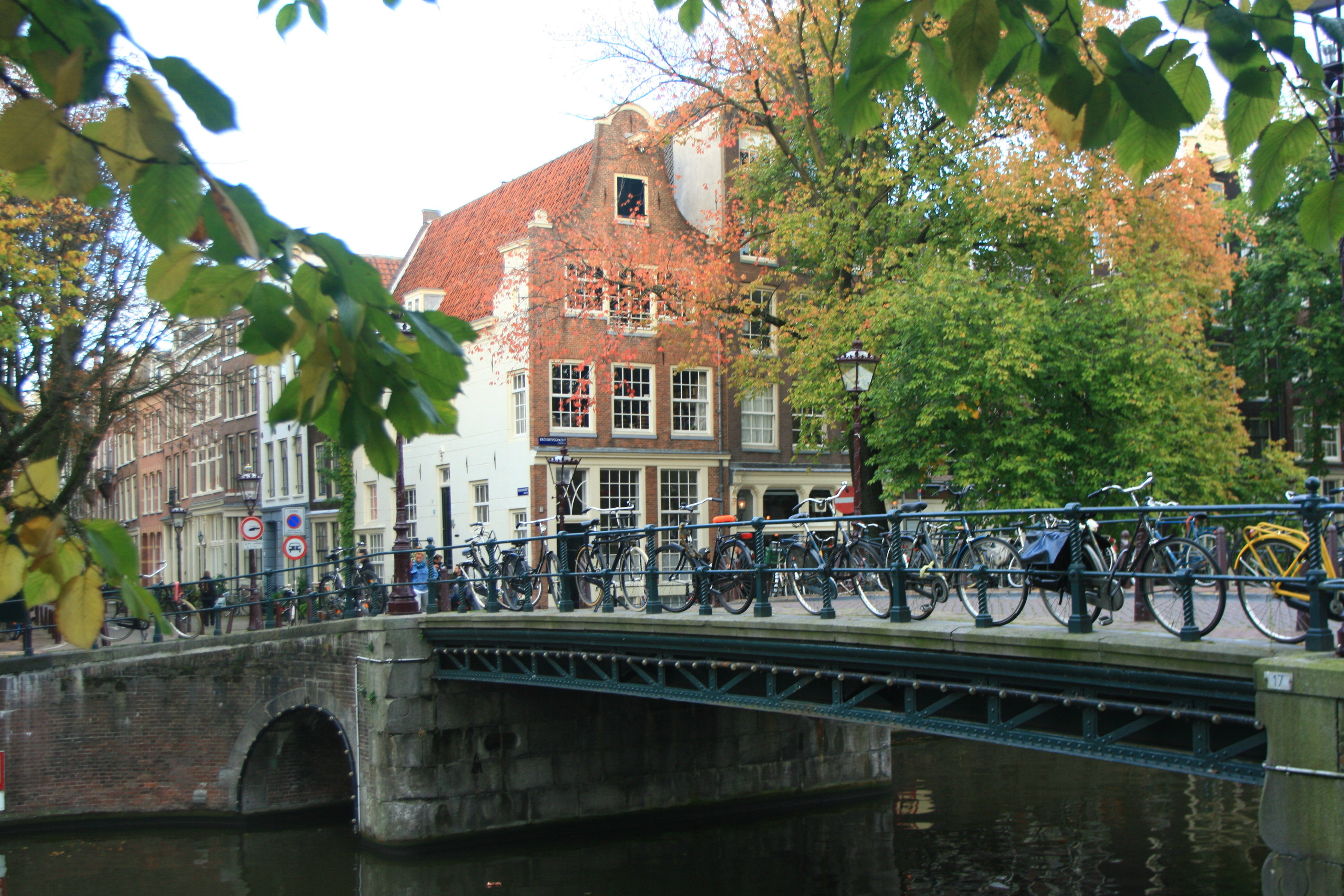 West-Indische huisbrug over de Brouwersgracht, zoals te lezen op straatnaambordje en brugnummer rechtsonder, Amsterdam, Netherlands